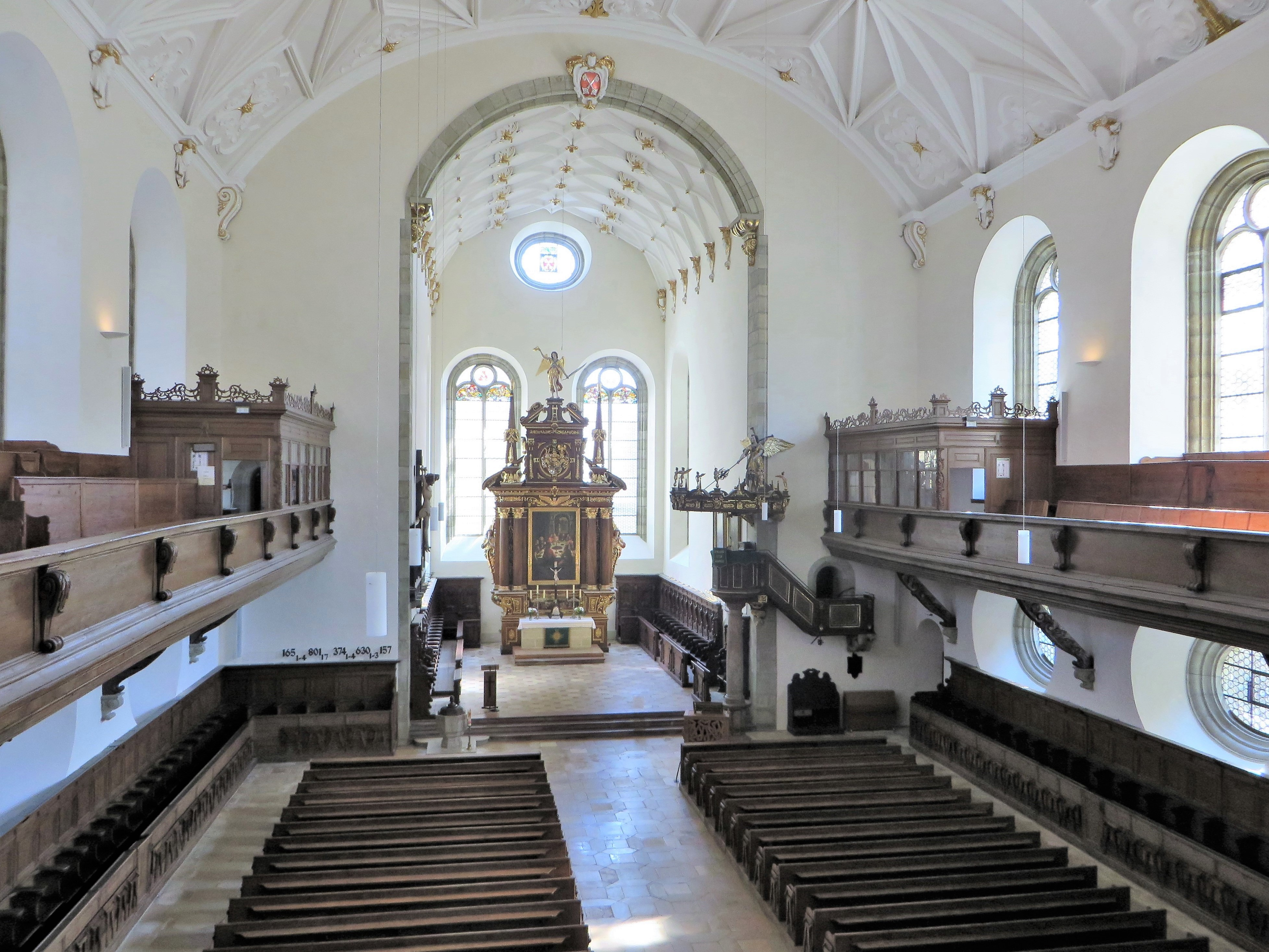 Dreieinigkeitskirche in Regensburg. Erbaut von 1627 bis 1631. Blick von der umlaufenden Empore auf das säulenlose Langhaus zum Chorraum.